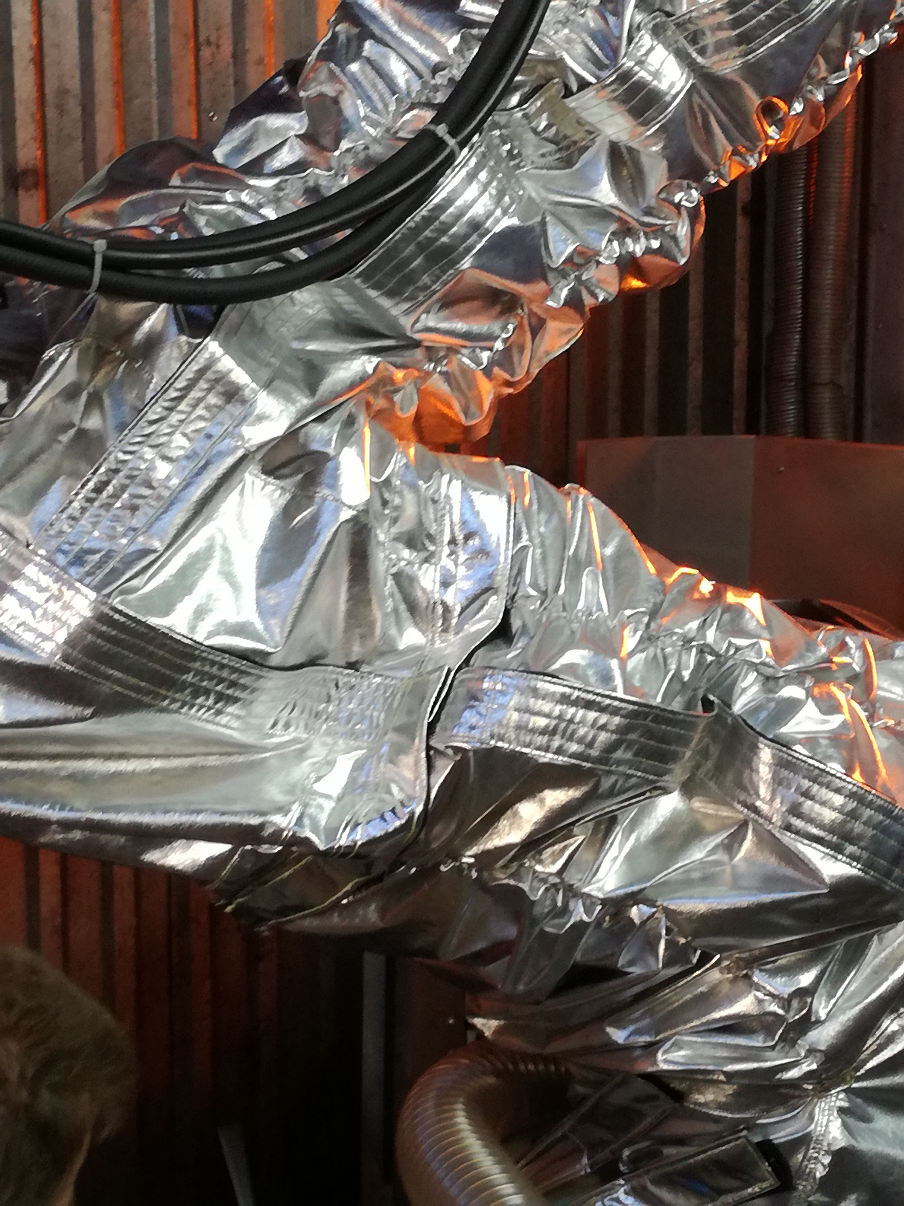 Pokrowiec ochronny znajdujący zastosowanie przy maszynach odlewniczych